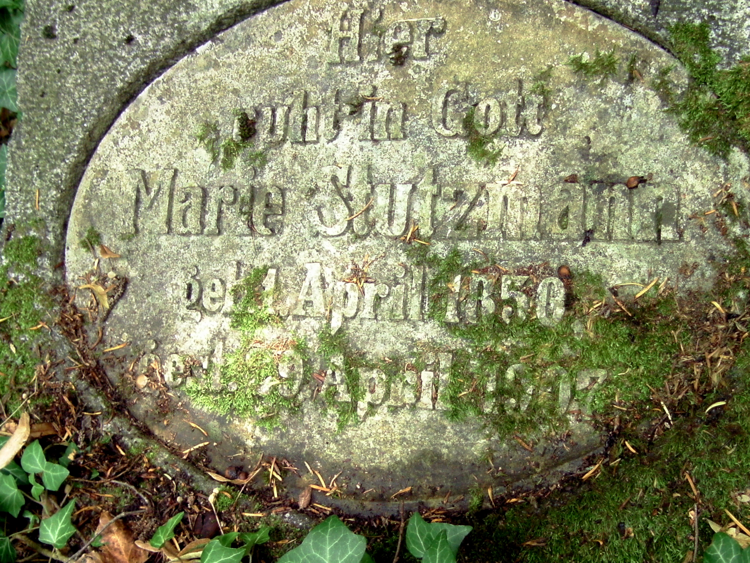 Grabmal für Marie Stutzmann Großtante von Wilhelm Moufang junior, Jurist, Autor und Astrologe, auf seinem Familiengrab Heidelberger Bergfriedhof, (Abt.D) Professorenweg